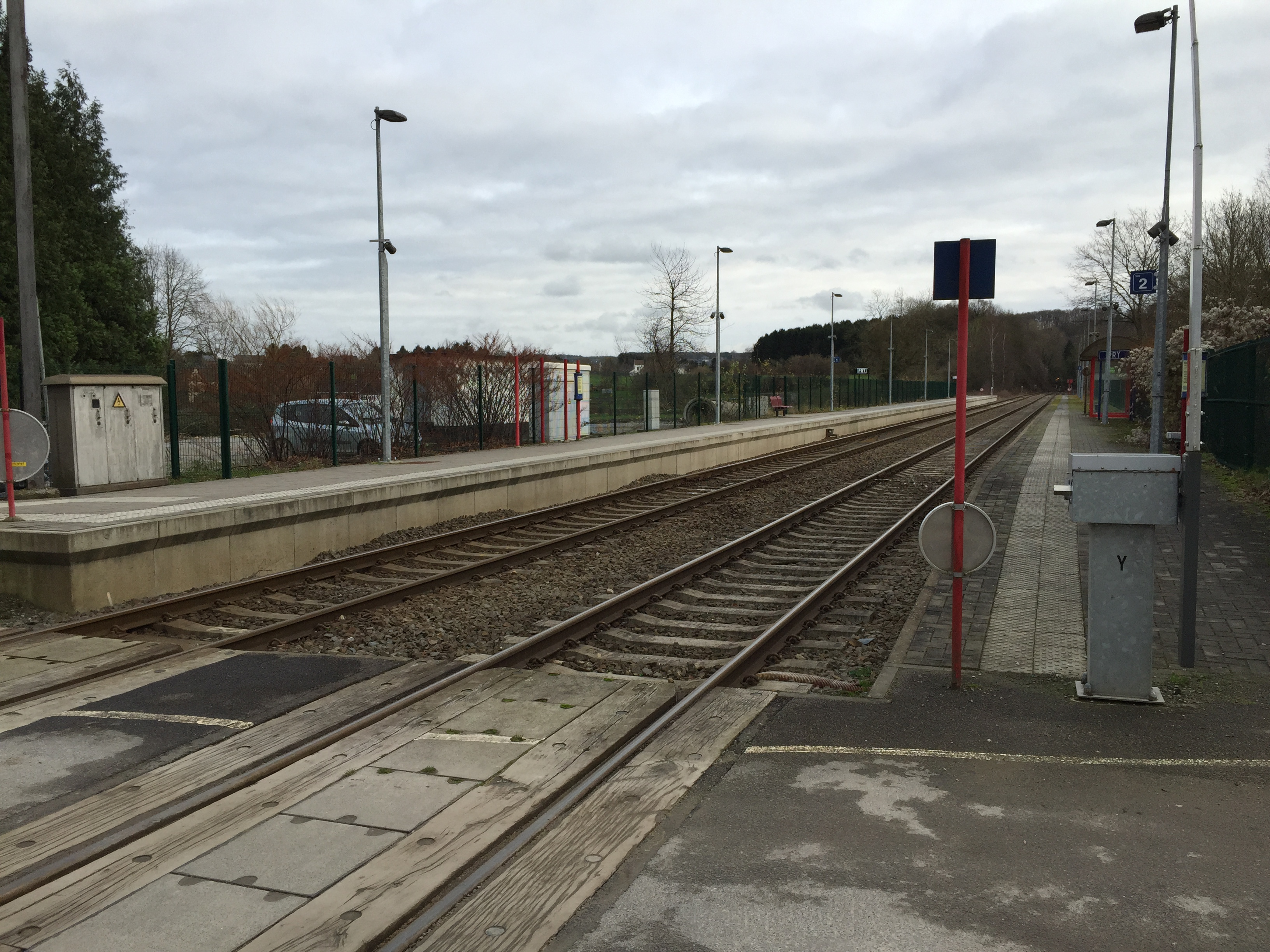 Gare de Pry (Commune de Walcourt) 5